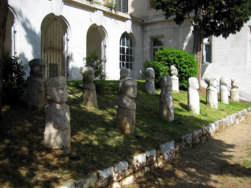 Adamićevi svjedoci pokraj Muzeja grada Rijeke u Rijeci